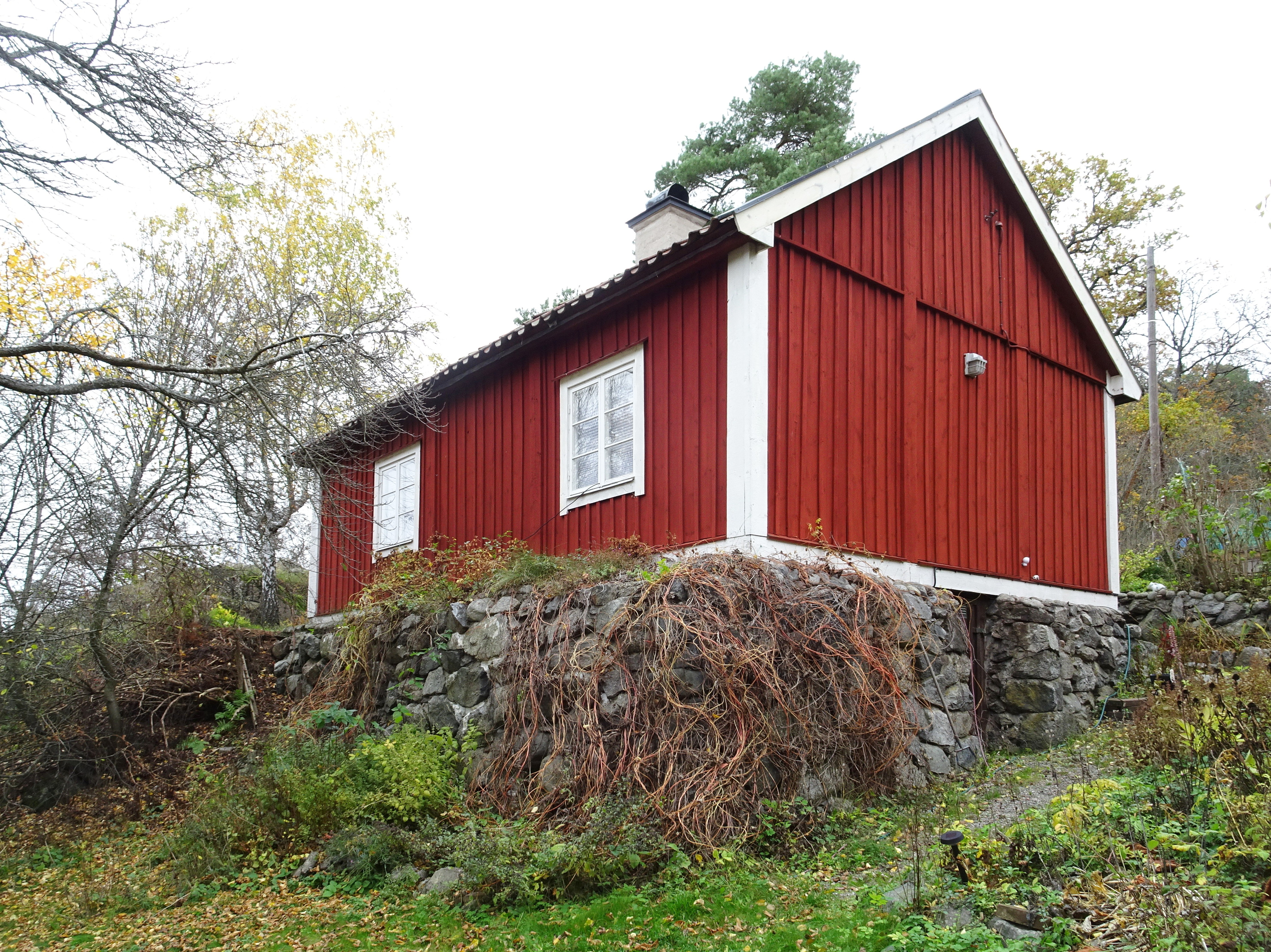 Före detta värdshus och sjökrog "Råstock" i Sätraskogens naturreservat